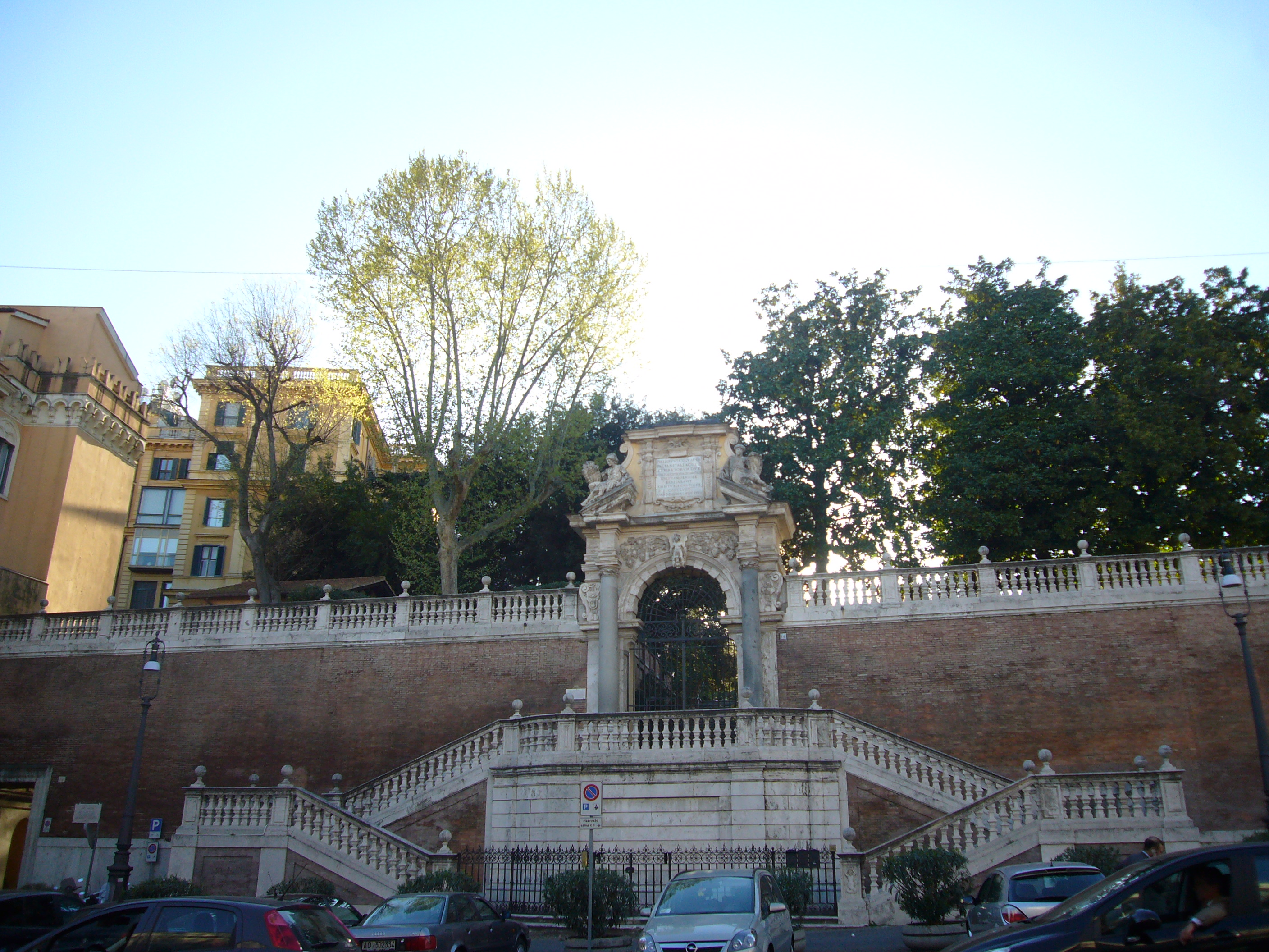 Roma, via XXIV Maggio. Ingresso superiore del palazzo Colonna. Sulla sinistra, l'immobile giallo è il palazzo Mengarini, già residenza del senatore Albertini e di vari membri della famiglia Agnelli.